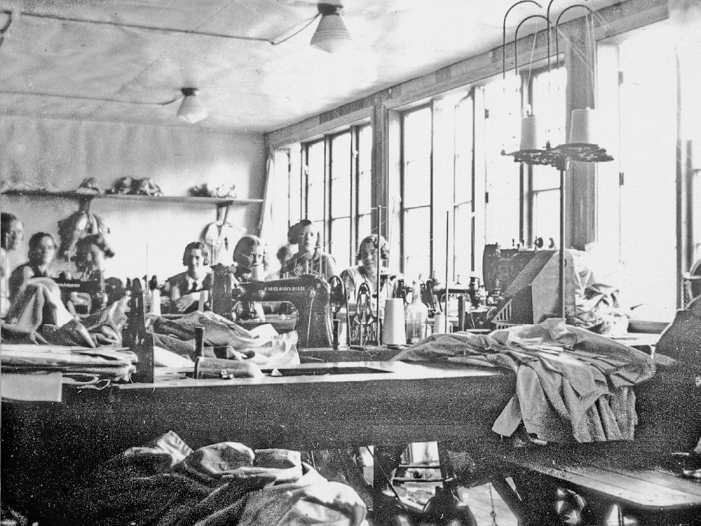 Picture from Sweden in the 1930's showing seamstresses at Syfabriken Special, a textile company that is today known as global shirt brand Eton Shirts.